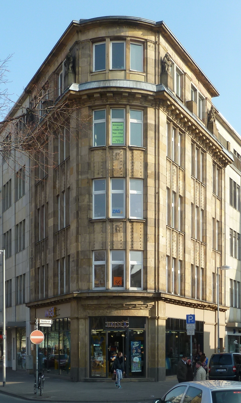 Wohn- und Geschäftshaus in Hannover, Georgstraße 2a, Baudenkmal